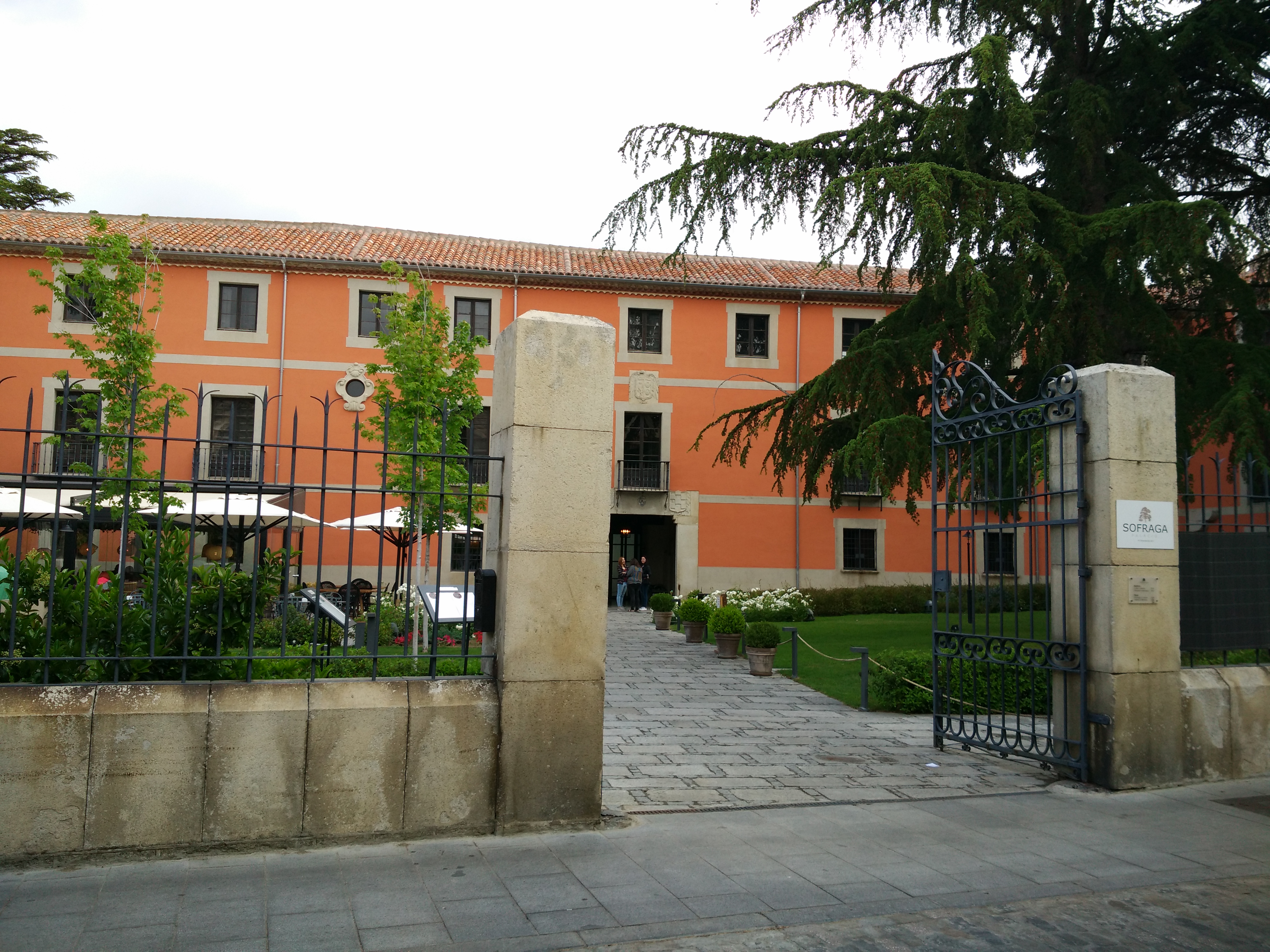 parte de la fachada y parte del patio del Palacio Sofraga con su imagen actual (2019)